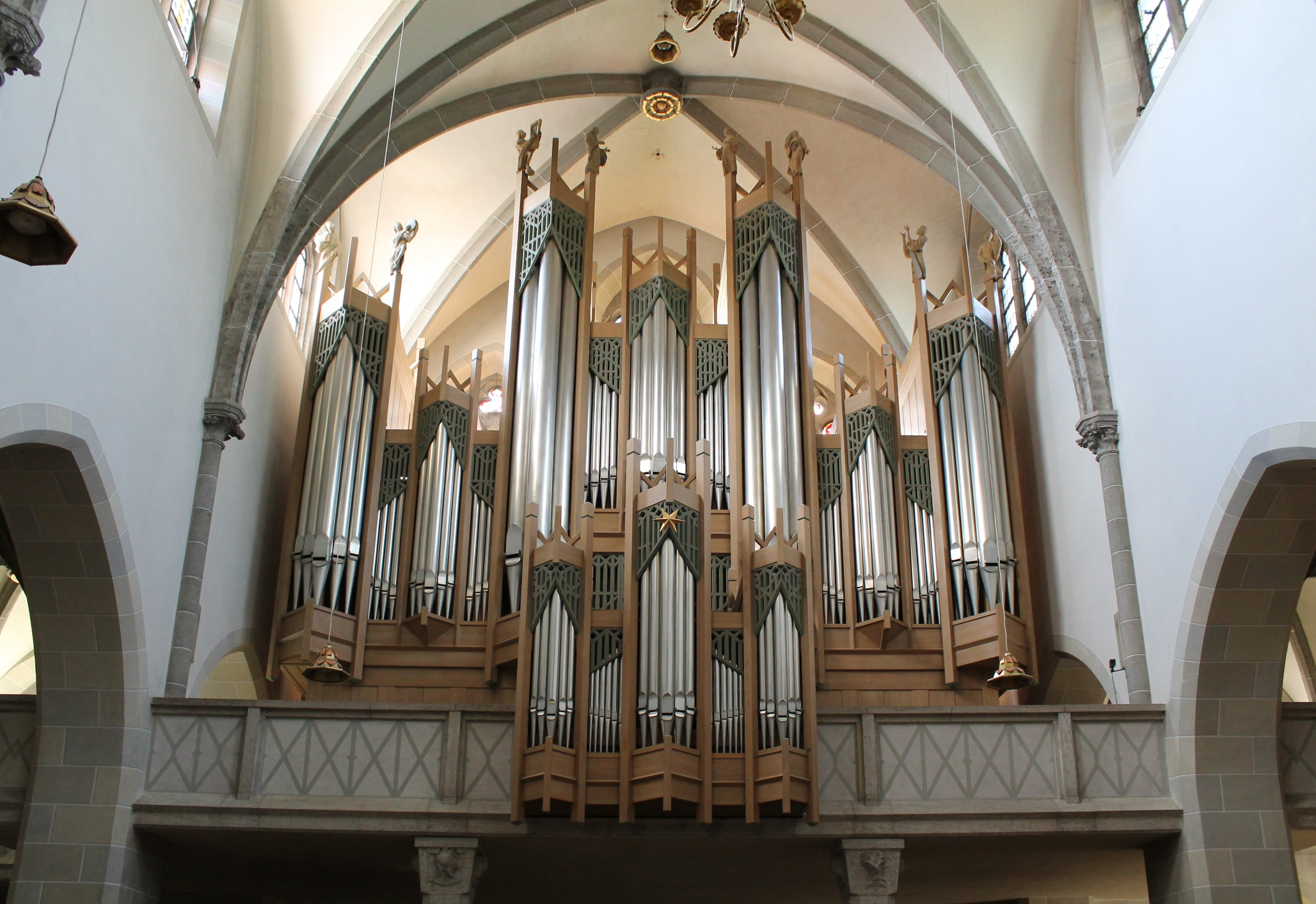 Orgel der Erzabtei St. Ottilien (1994, Sandtner op. 214, III/47)